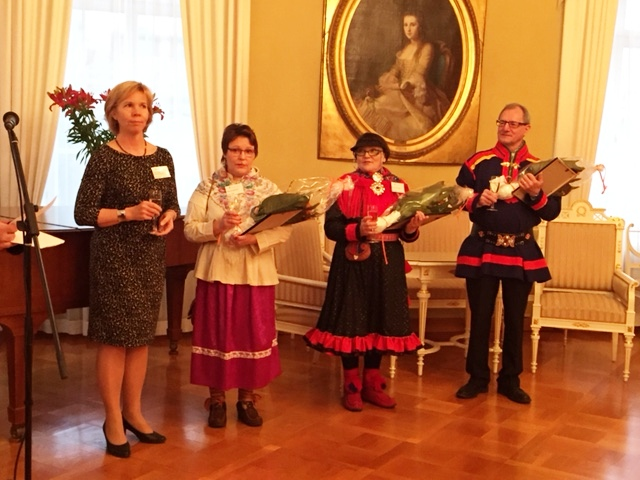 Samisklærer og forsker Mikael Svonni, forfatter Kerttu Vuolab og lærer i østsamisk Seija Sivertsen får årets språkpris Gollegiella